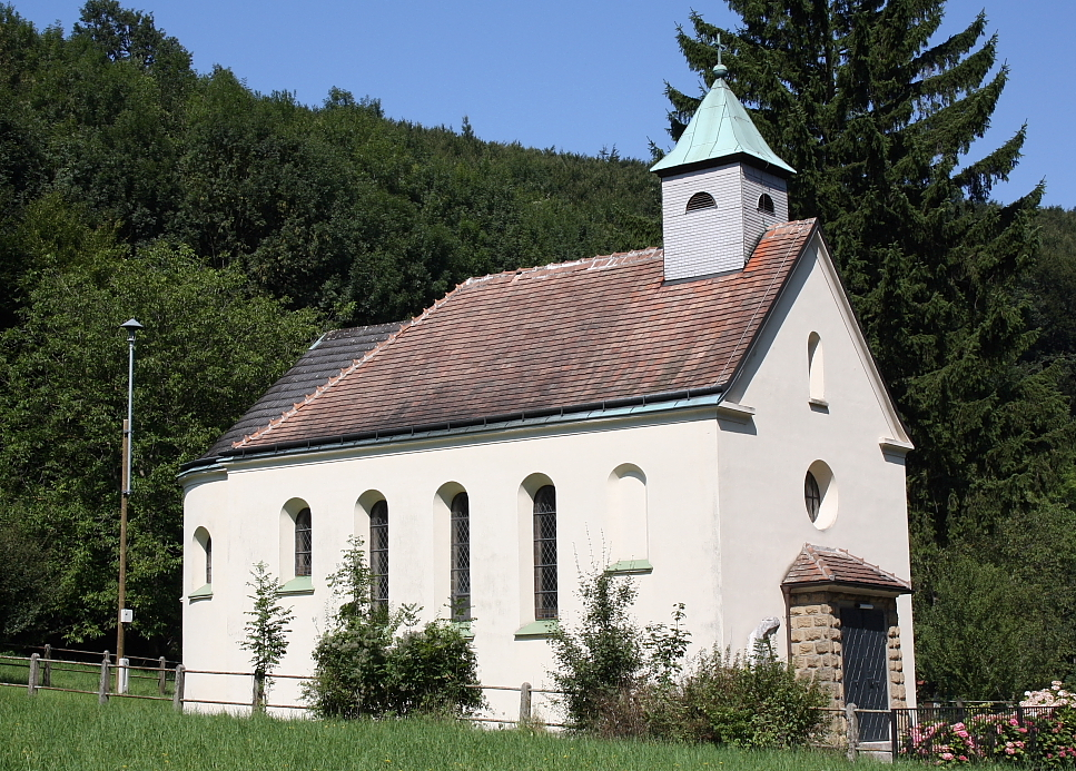 Die von Josef Schömer erbaute Kapelle "Maria Namen" in der Ortschaft Weidlingbach, Gemeinde Klosterneuburg, Niederösterreich.